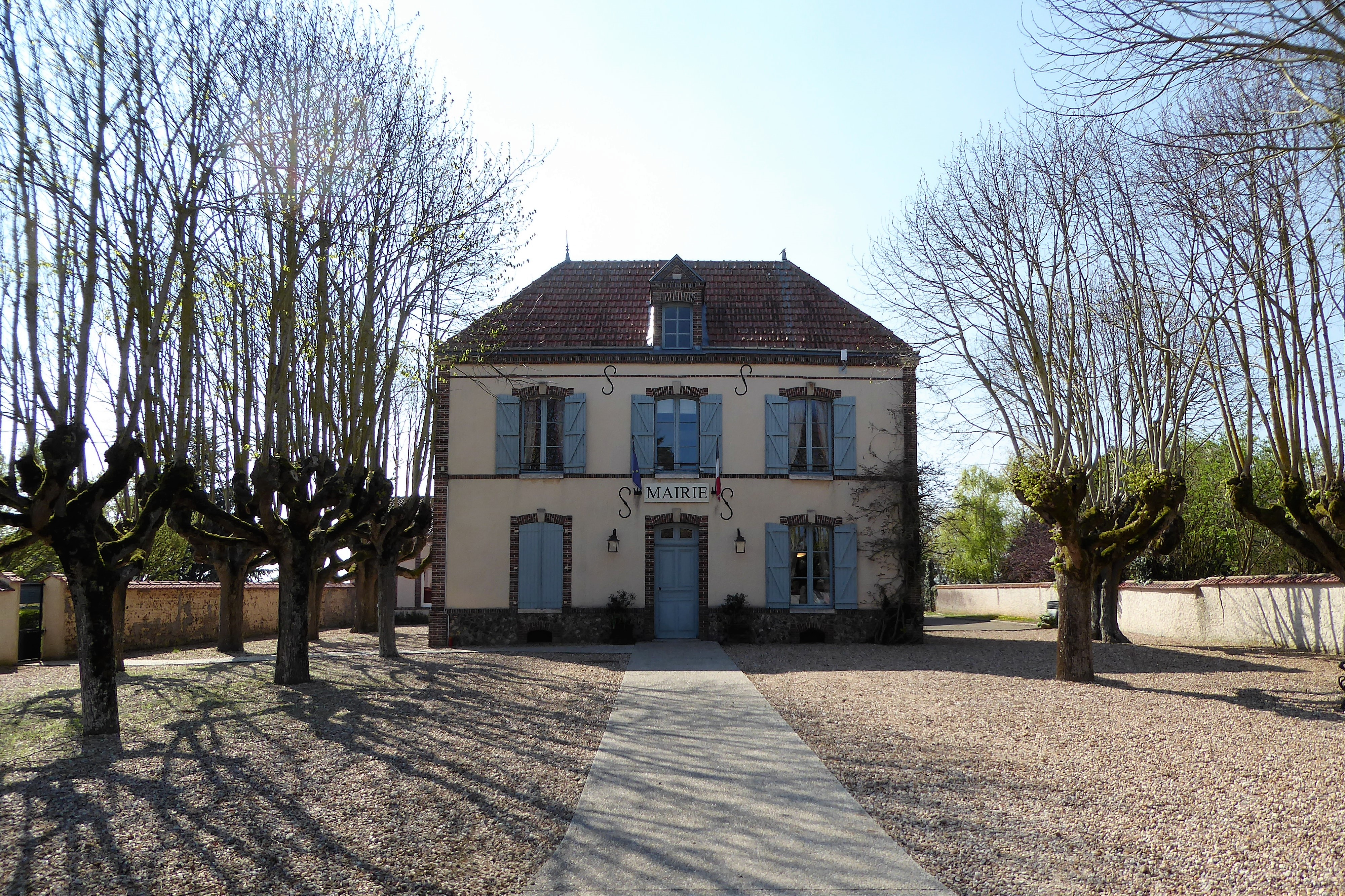 Mairie de Serville, Eure-et-Loir, France.